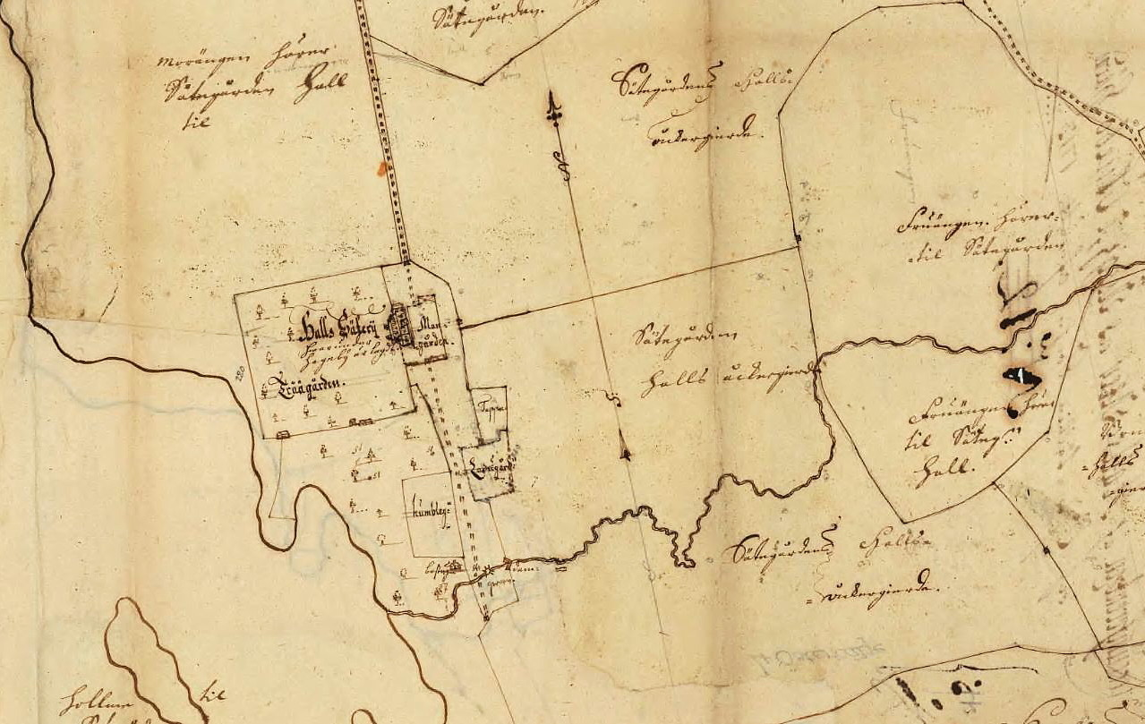 Säteriet Hall med omgivning